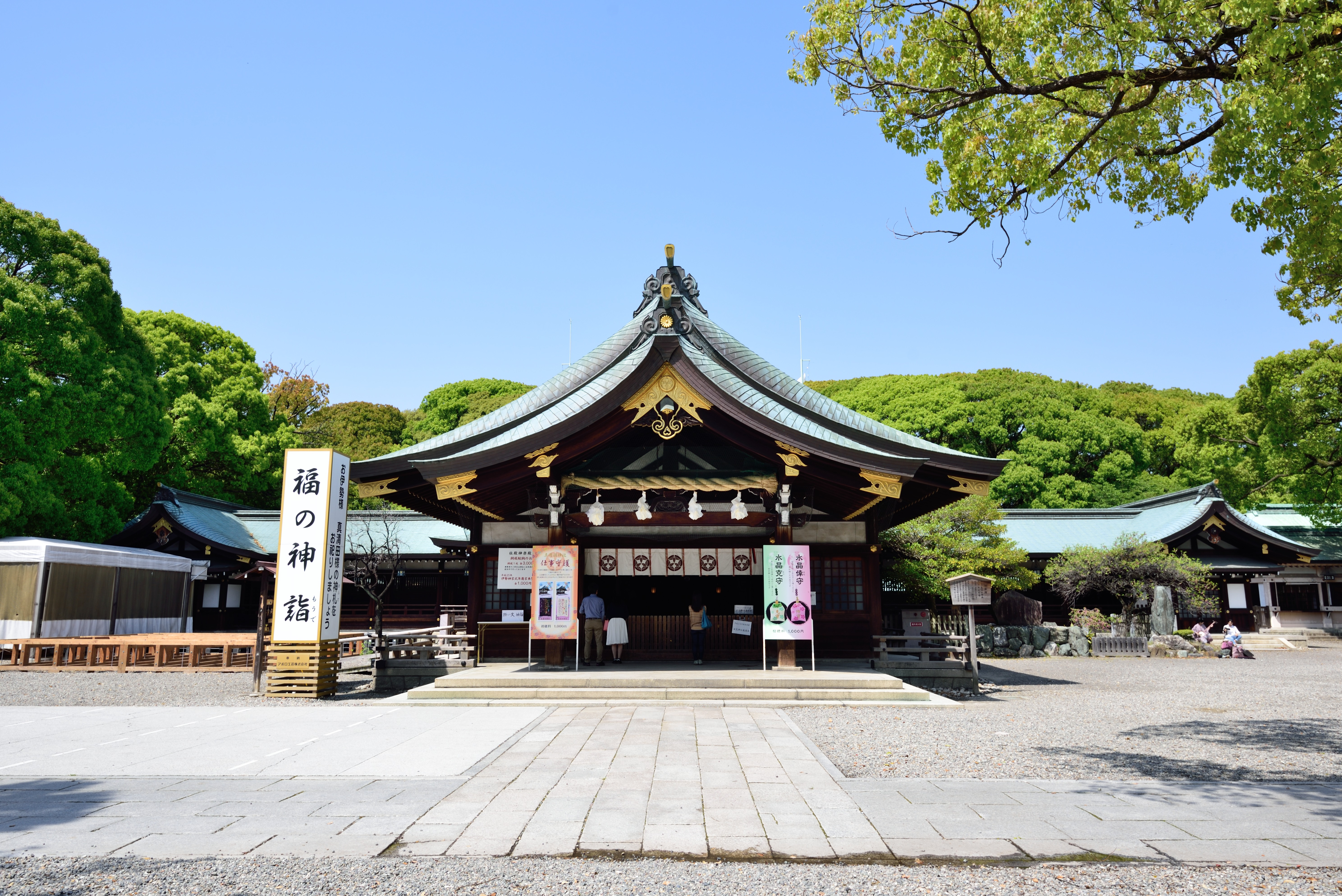 真清田神社の拝殿 Nikon D750